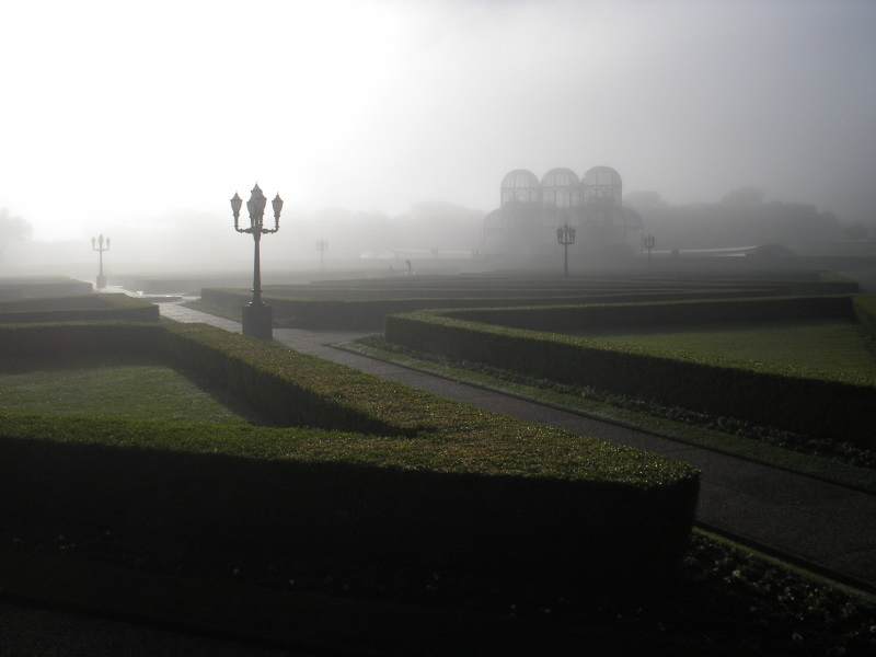 Neblina numa manhã fria no Jardim Botânico de Curitiba, PR, Sul do Brasil.